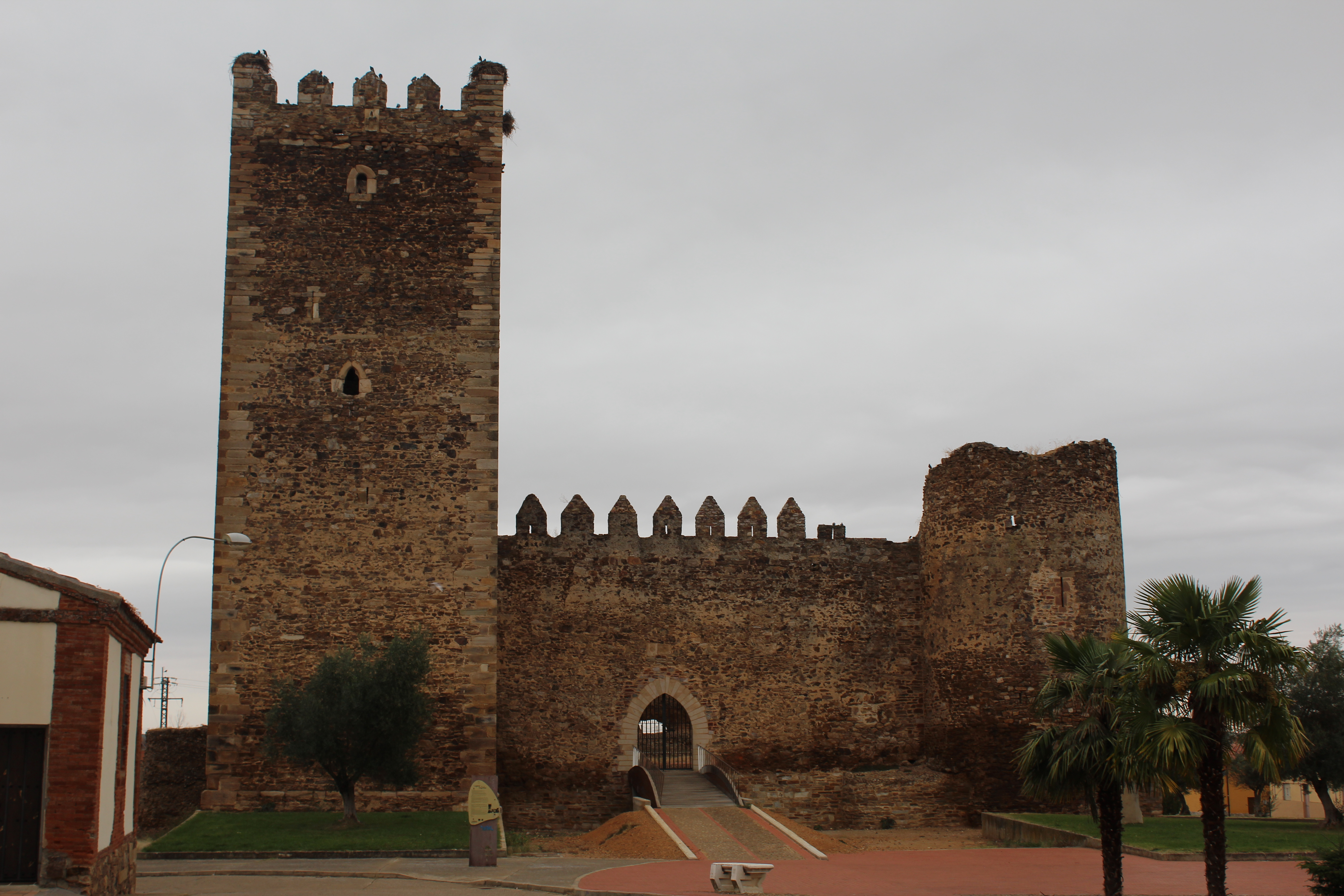 Castillo